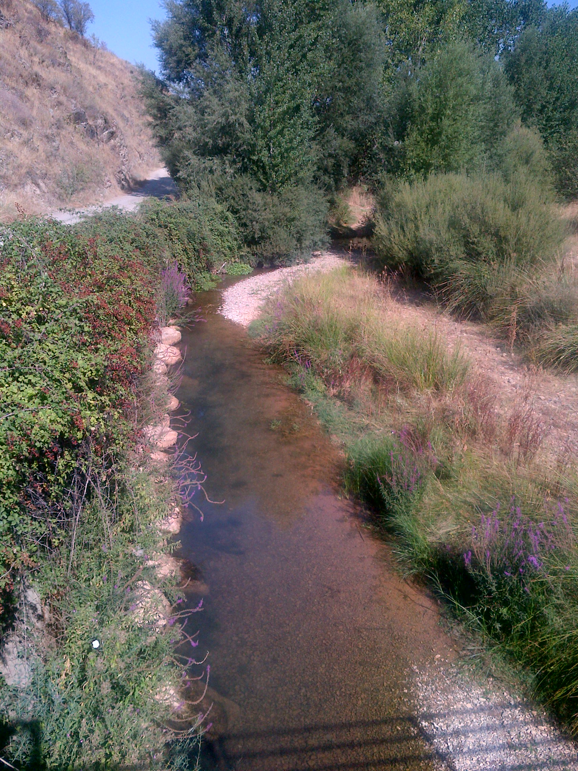 El río Manubles al final del verano cerca de su desembocadura presenta fuertes estiajes